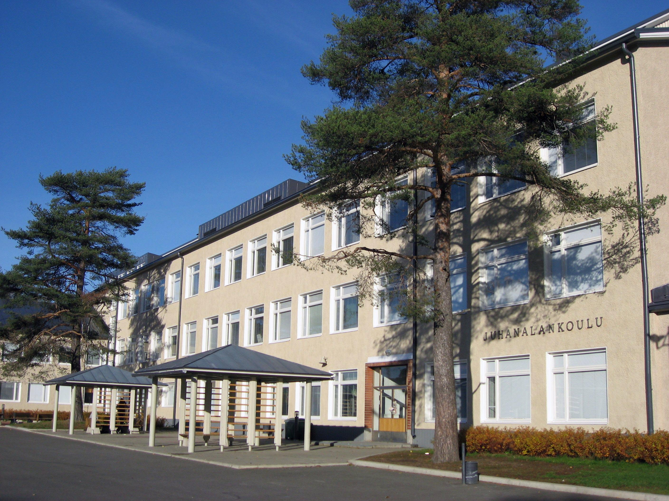 Niinivaaran lukio, Juhanalan koulu, Joensuu